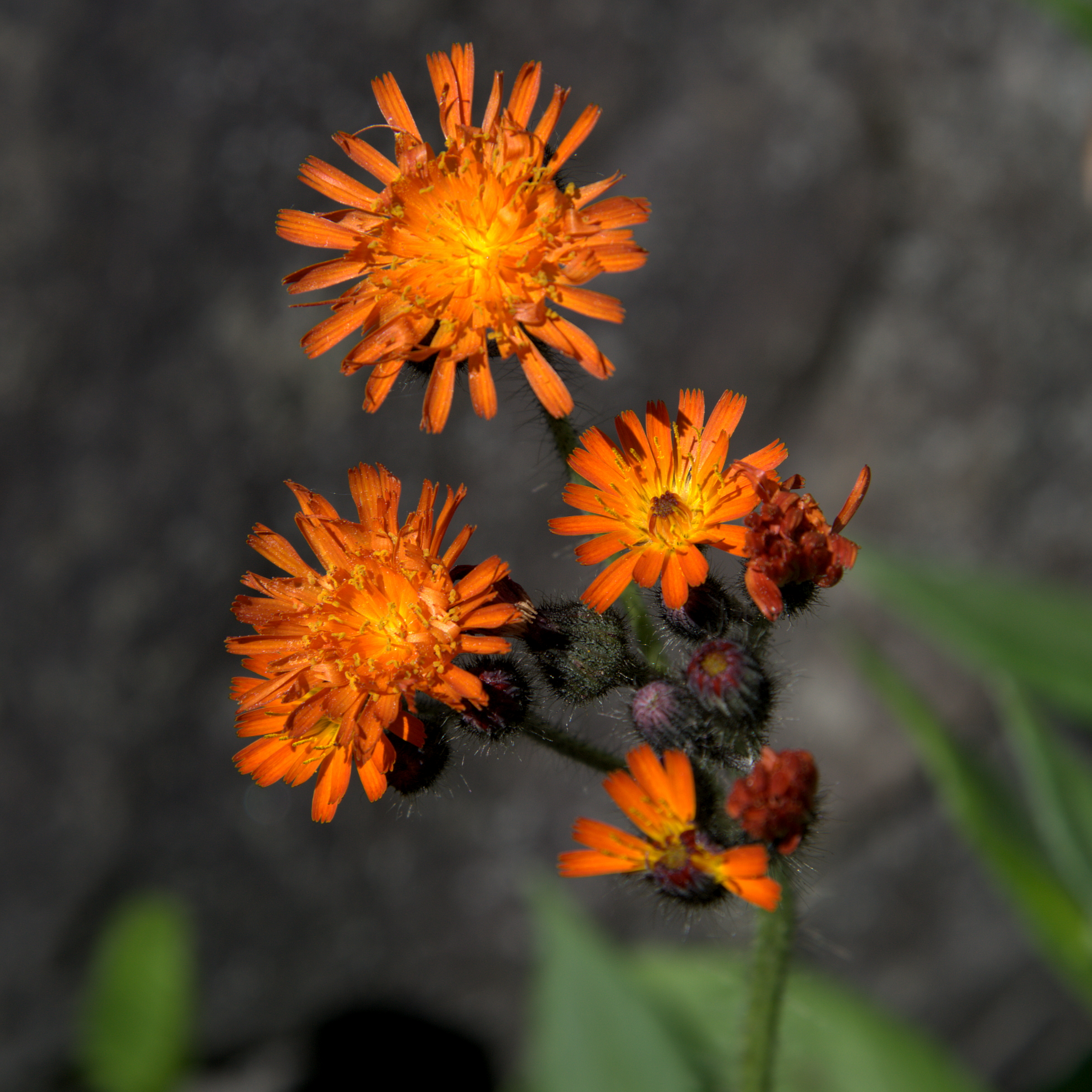 Pilosella aurantiaca